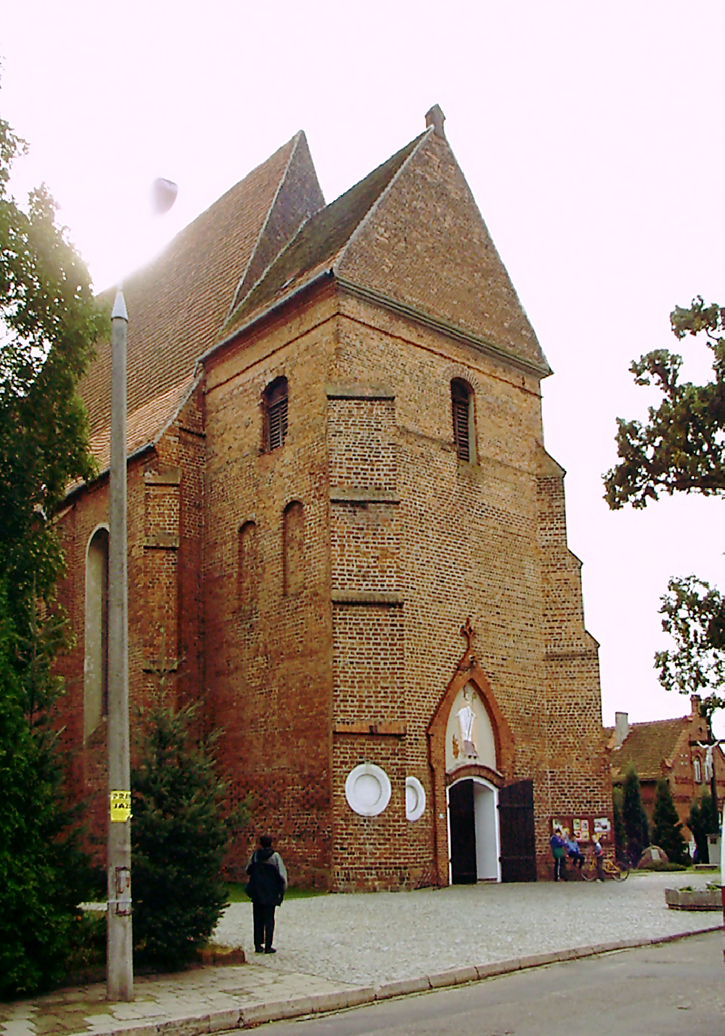 Kobylin, kościół par. p.w. św. Stanisława, ul. Kościelna, 1518